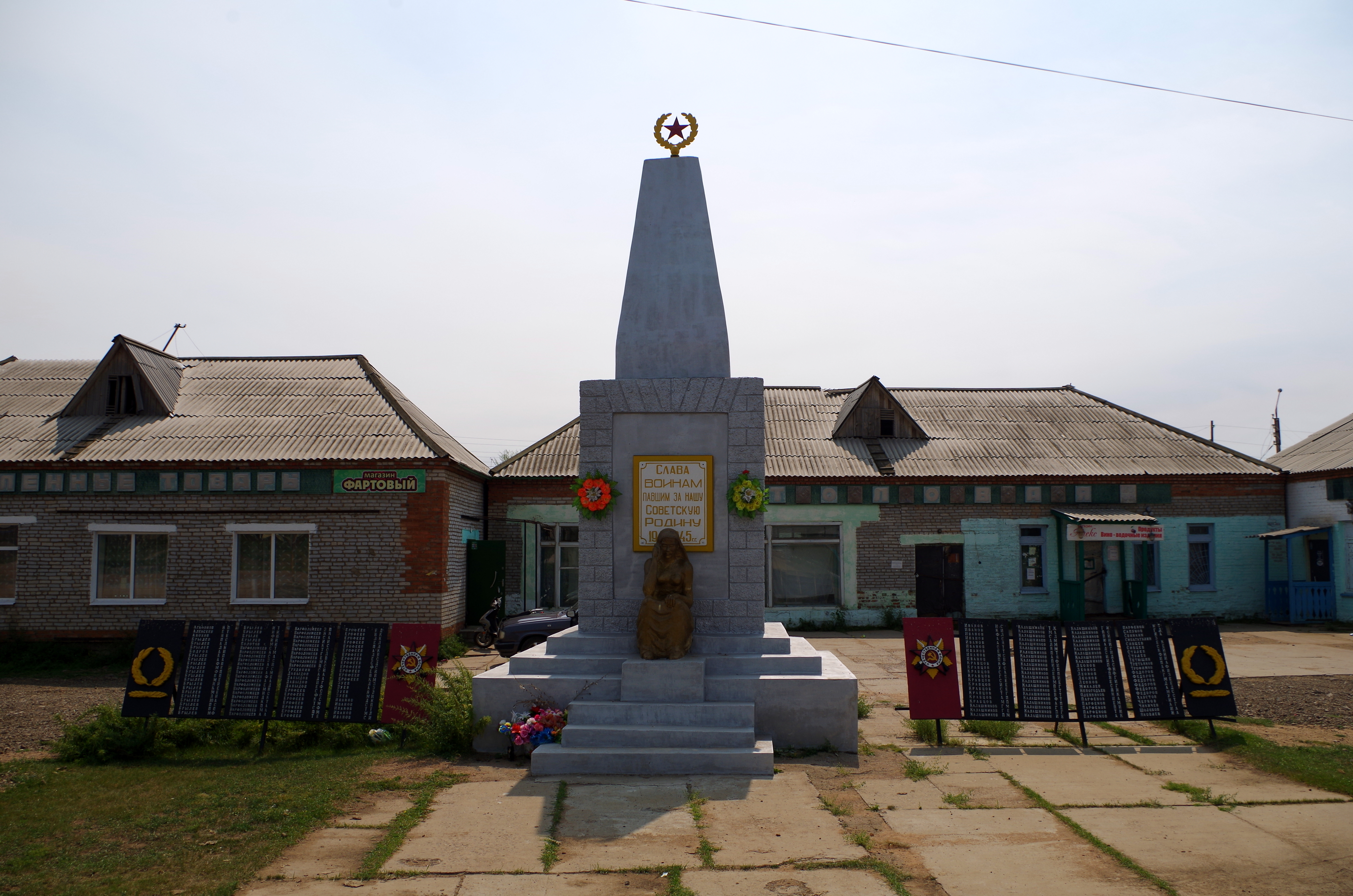 Памятник воинам-землякам, погибшим в годы Великой Отечественной войны. с. Никольск, Мухоршибирский р-он, Бурятия, Россия.